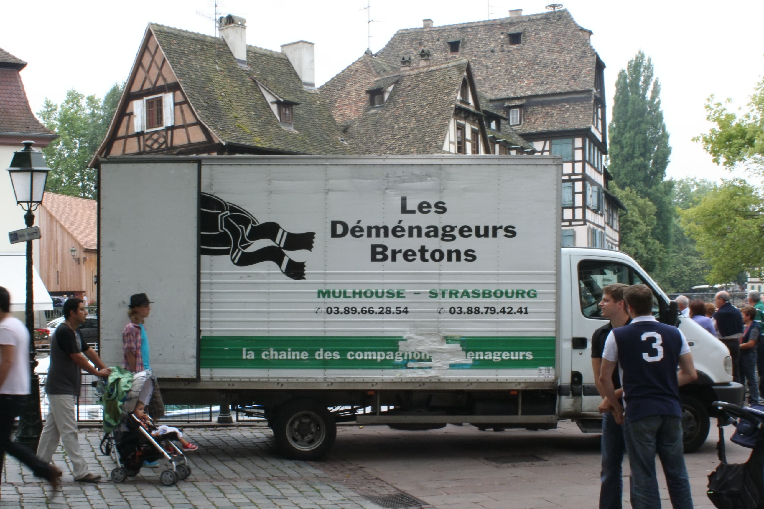 Camion des déménageurs bretons dans la Petite France à Strasbourg.